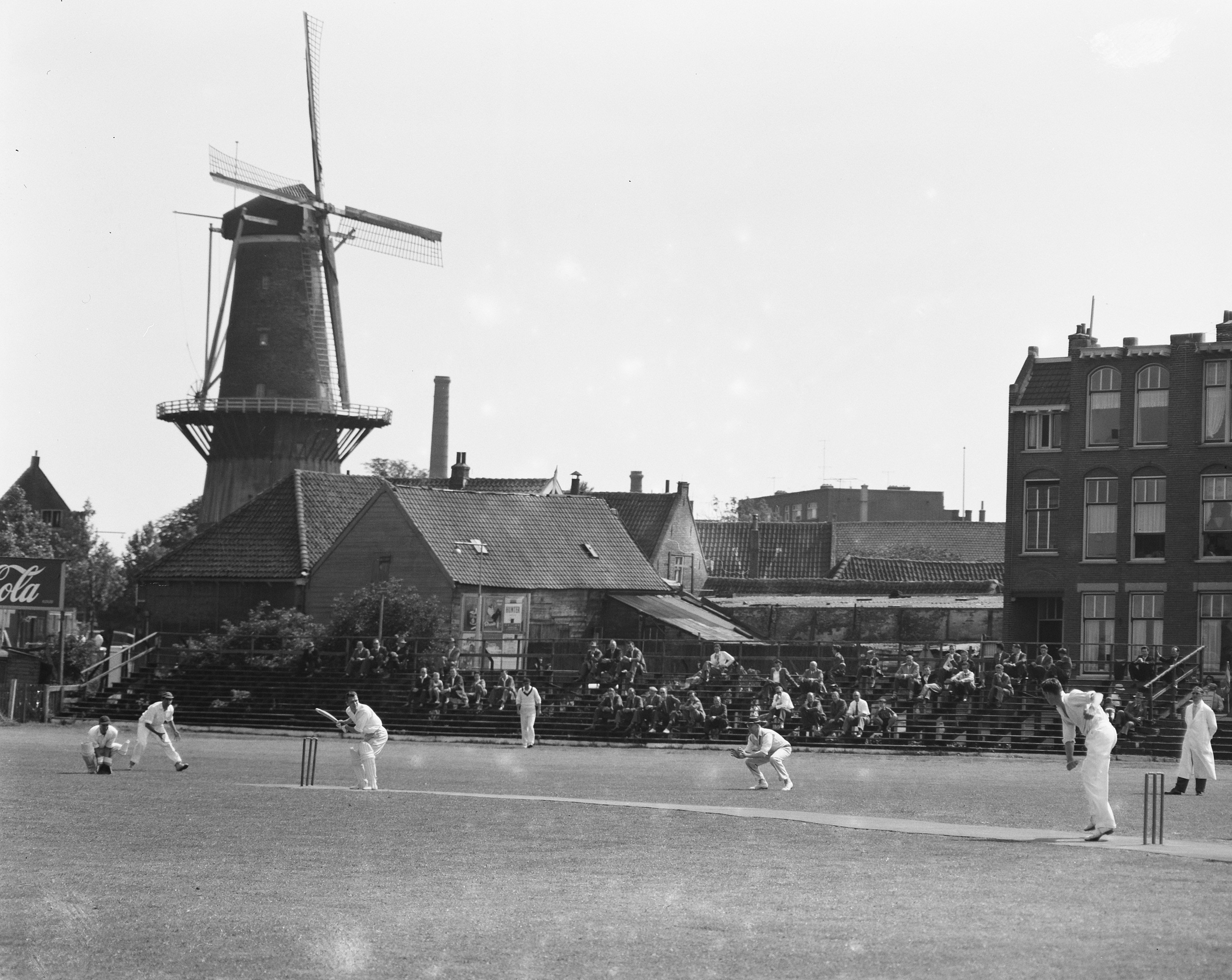 Collectie / Archief : Fotocollectie Anefo Reportage / Serie : [ onbekend ] Beschrijving : Cricketwedstrijd Hermes DVS tegen ACC te Schiedam. Batsman Baily van HDVS en bowler Henk van Weelde (ACC) Datum : 4 augustus 1957 Locatie : Schiedam, Zuid-Holland Persoonsnaam : Baily, HDVS Fotograaf : Behrens, Herbert / Anefo Auteursrechthebbende : Nationaal Archief Materiaalsoort : Negatief (zwart/wit) Nummer archiefinventaris : bekijk toegang 2.24.01.04 Bestanddeelnummer : 908-8374 Reacties Geplaatst door L.Franken op 04 november 2008 - 03:05. Op de achtergrond molen de Drie Koornbloemen, en op de voorgrond Oude Damlaan